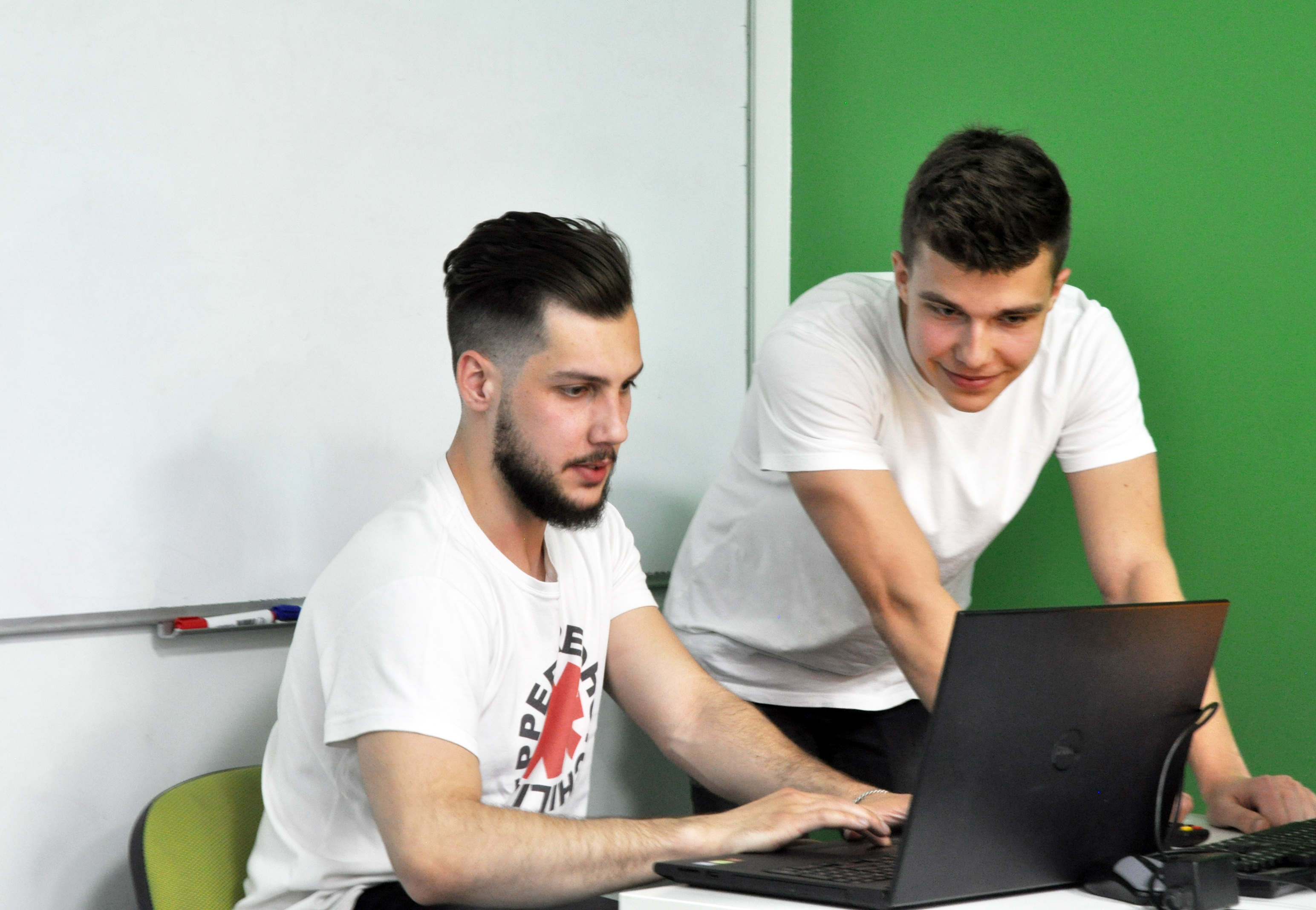 Тренер со студентом разбирает работу